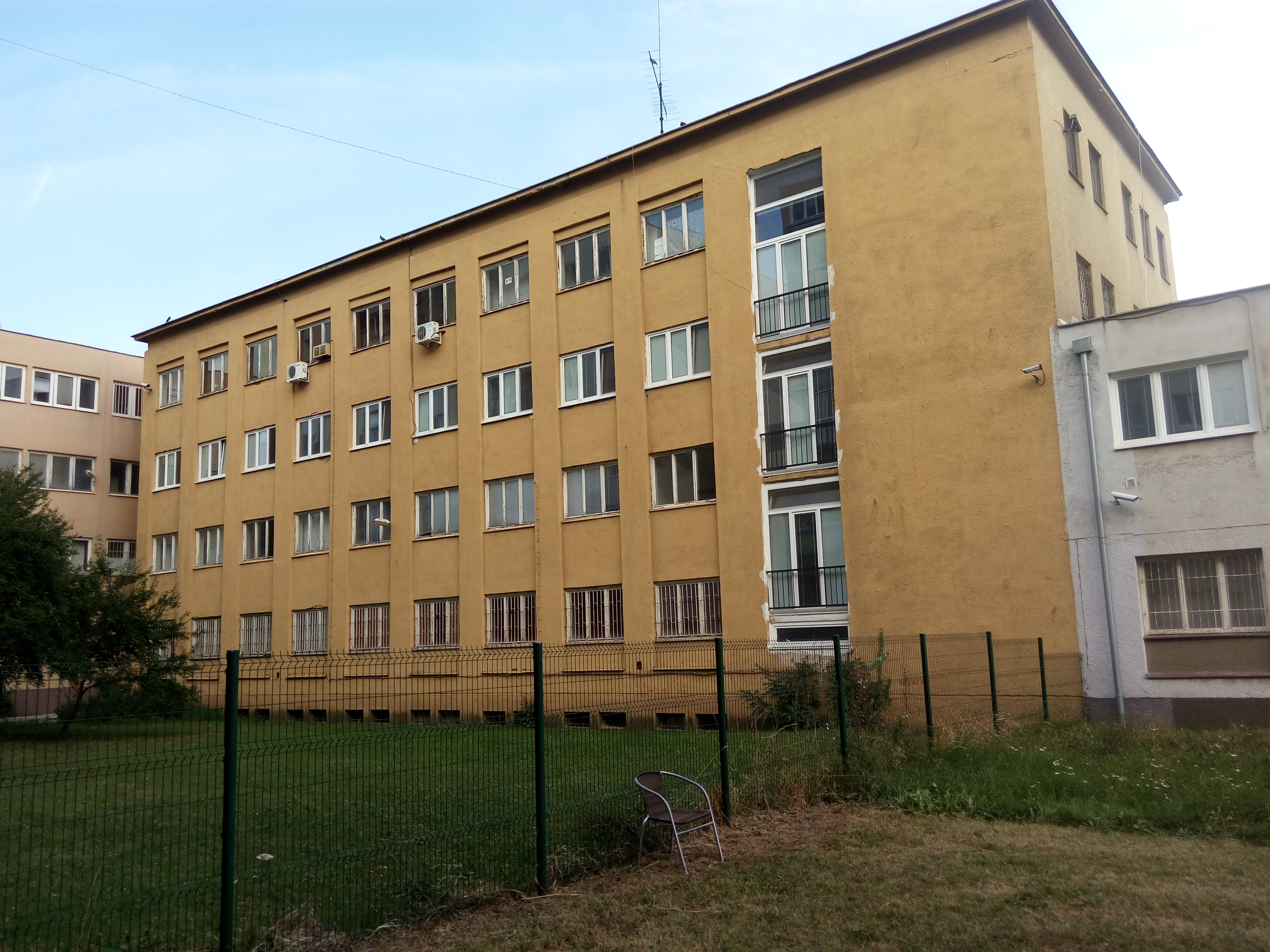 Nobelova 16, Nové Mesto, Bratislava